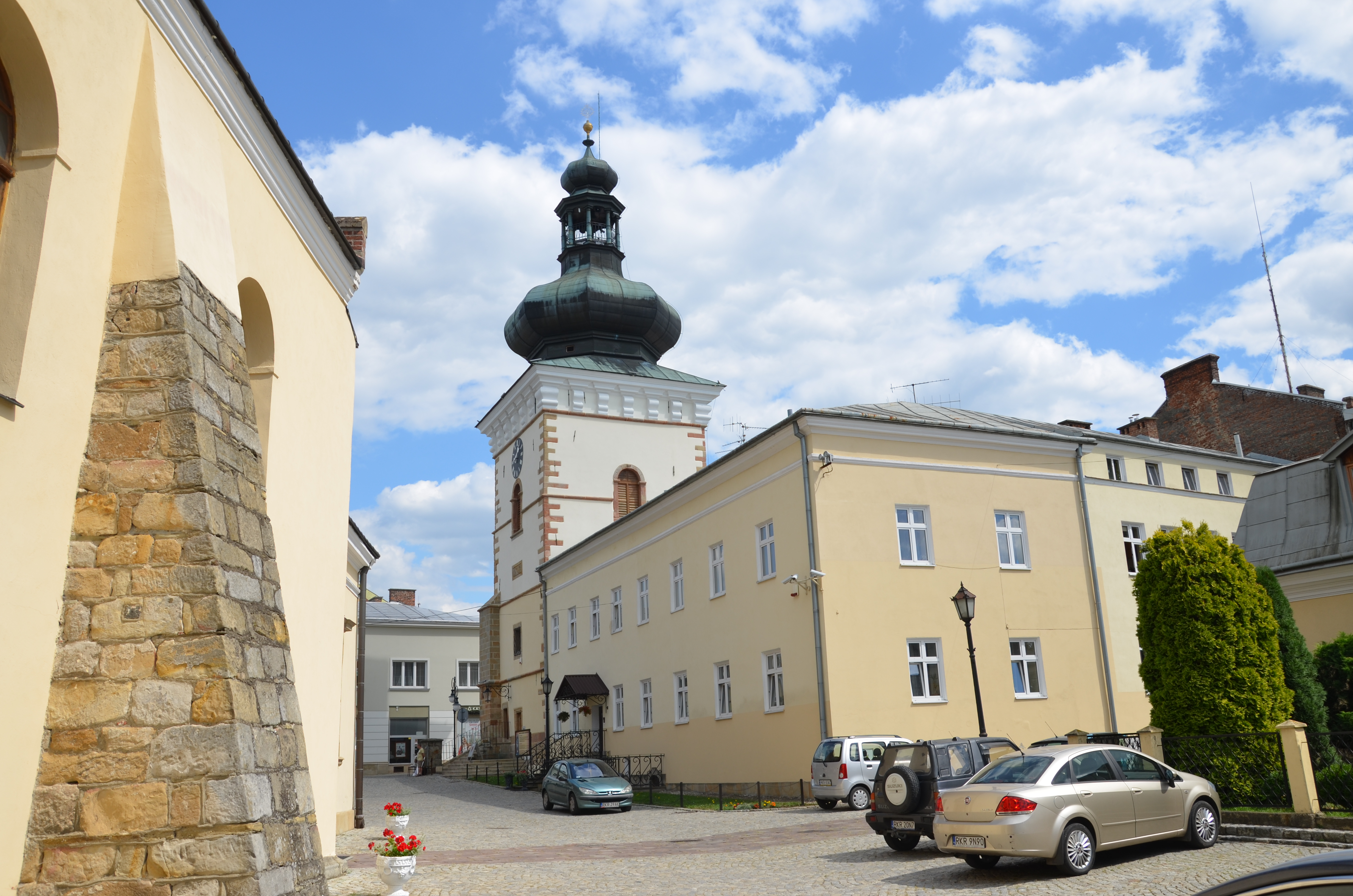 Altstadt Krosno